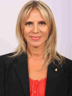 Lily Pérez San Martín